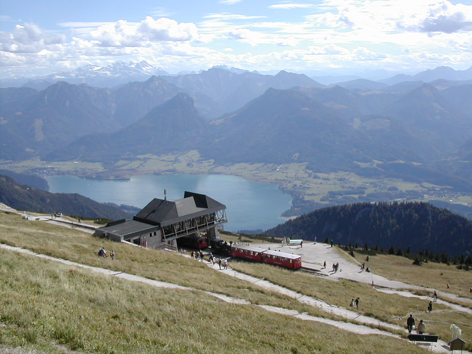 Schafberg